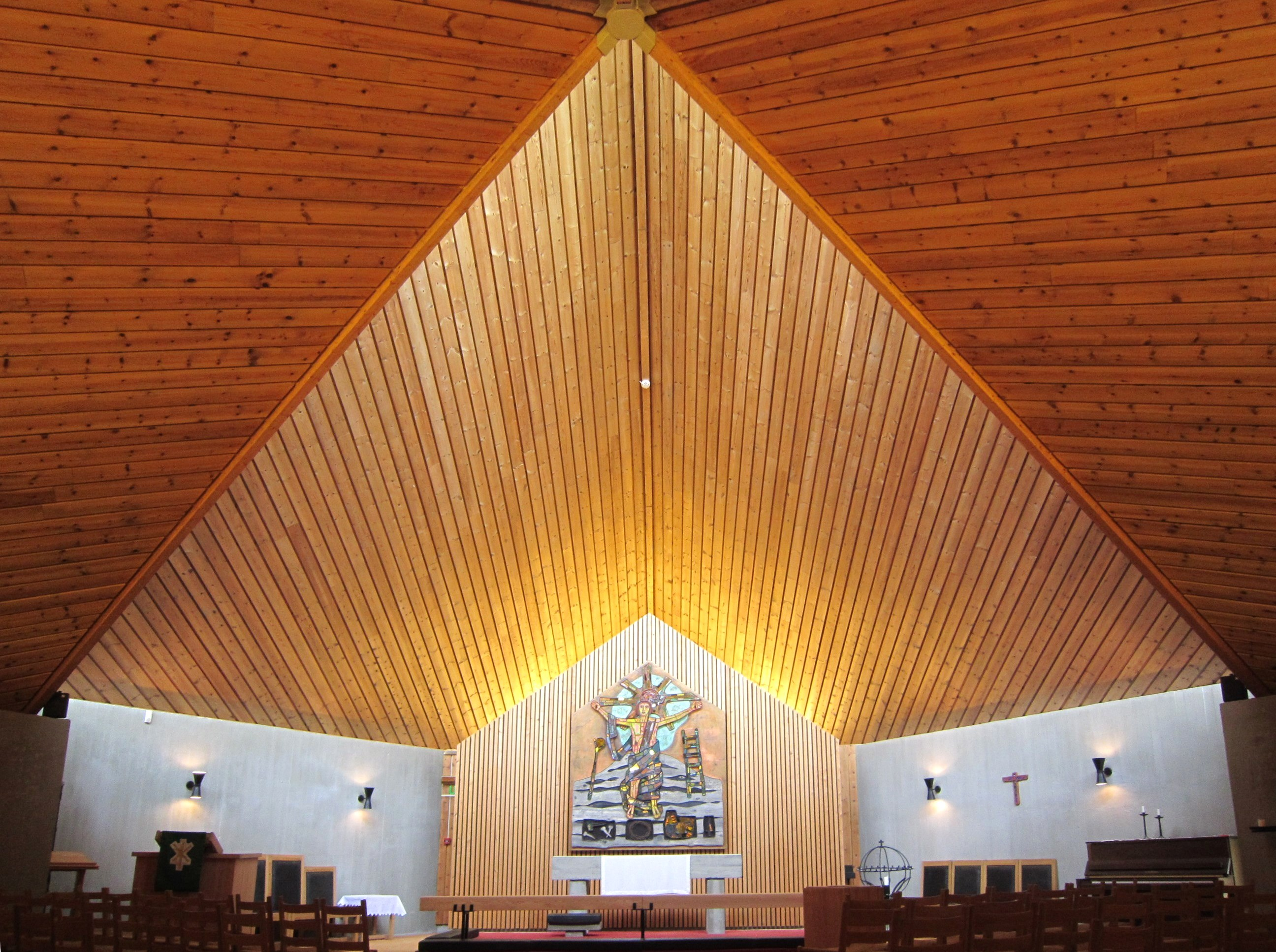 Skurdalen kirke